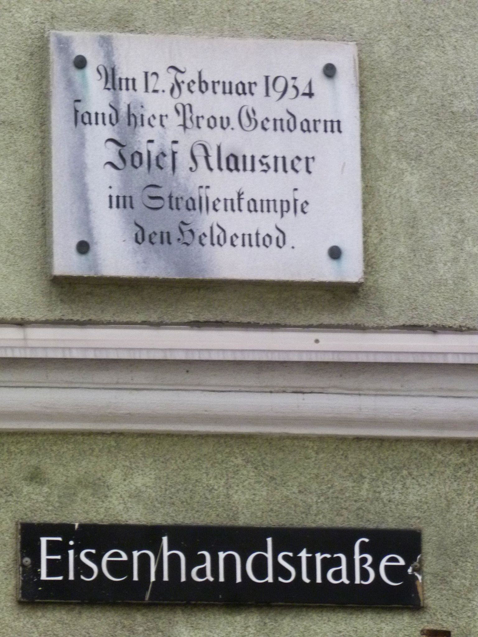 Eiserne_Hand (Linz) Gedenktafel für Josef Klauser